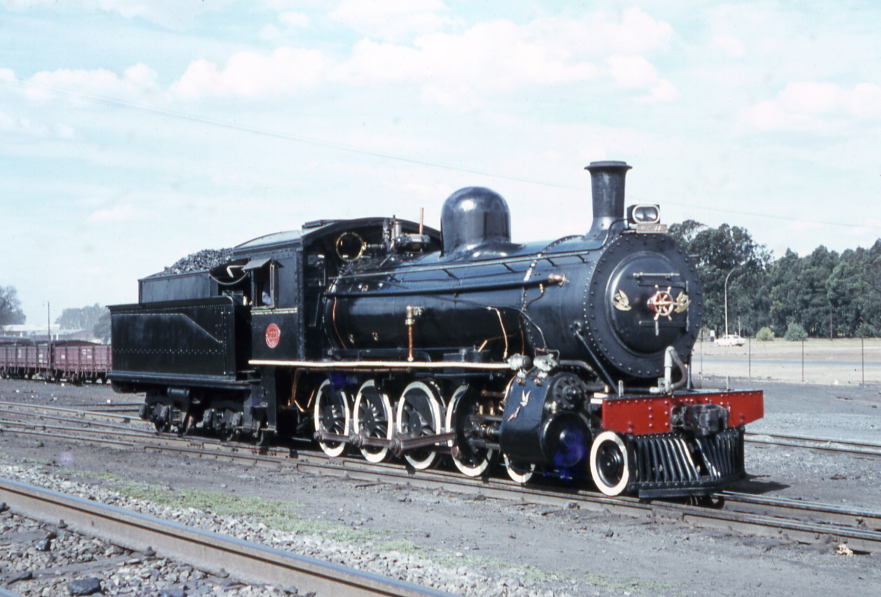 Class 8D no. 1223